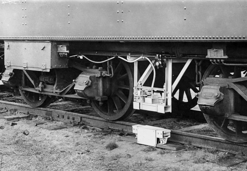 Keine Eisenbahnunglücke mehr! Eine neuartige Zugsicherung an D-Zug-Lokomotiven. Diese Vorrichtung soll das Überfahren des Haupt-Signals unmöglich machen. Bei Überfahren des Haupt-Signals wird eine an dem Tender der D-Zug Lokomotive angebrachte elektro-magnetische Bremsvorrichtung ausgelöst und bringt den D-Zug sofort zum Stehen. Der Vorgang ist eine Übertragung elektro-magnetischer Kräfte vom Haltesignal auf die Lokomotive und deren Zug-Bremse. Die elektro-magnetische Bremsvorrichtung unter dem Tender der D-Zug Lokomotive, welche beim Überfahren des Haupt-Signals durch elektromagnetische Kräfte angezogen wird und die Bremsvorrichtung selbstständig auslöst.